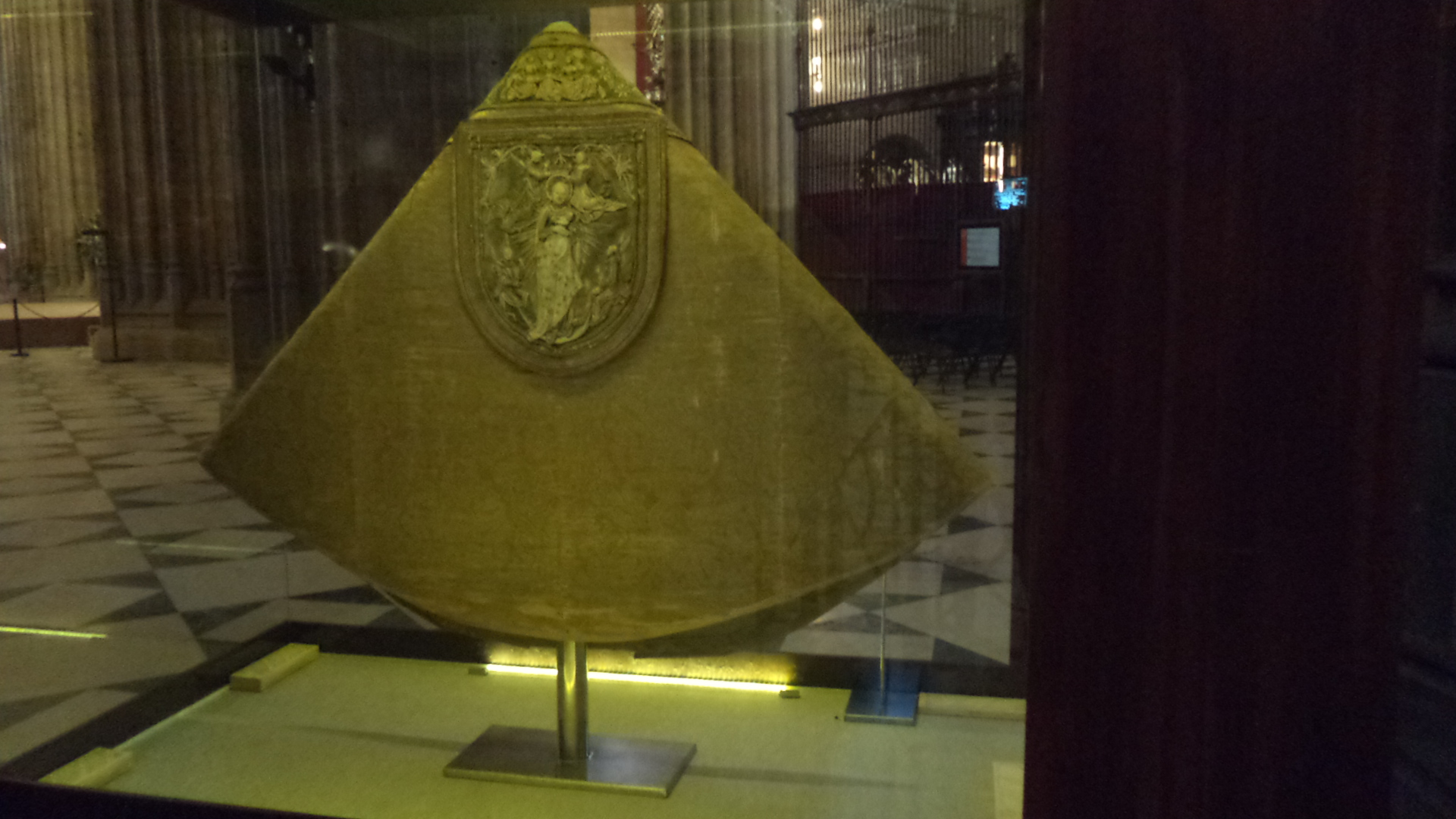 Capa pluvial utilizada por el emperador Carlos I de España (1500-1558) en su coronación en Aquisgrán. Se encontraba en la iglesia de Santiago de Sevilla y, tras ser restaurada en el año 2000, se expone en una vitrina de la catedral de Sevilla, (España).